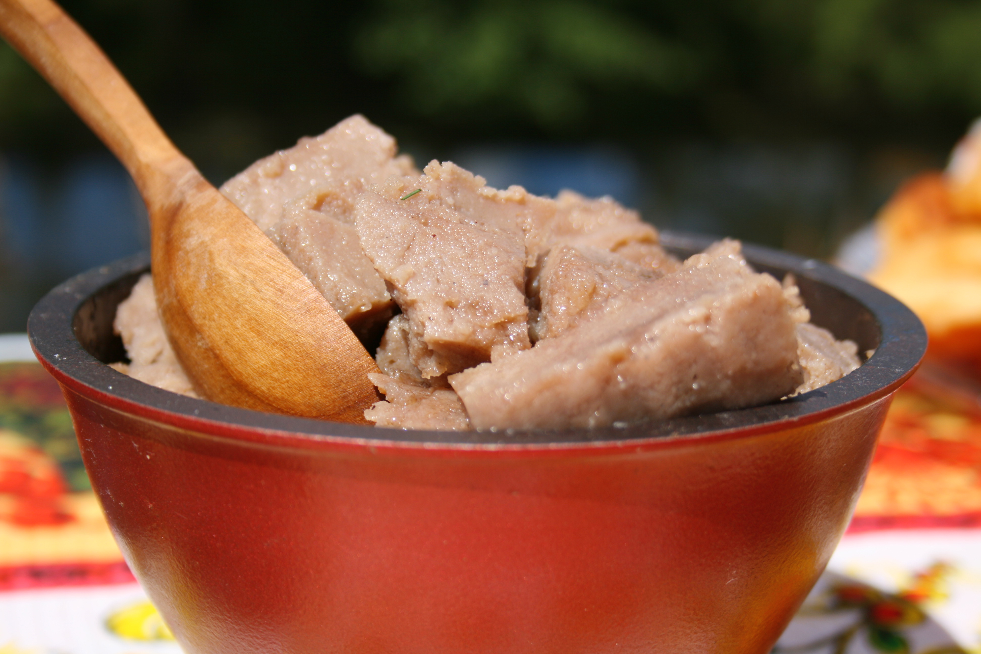 Саламата на фестивале «Маланья», Белгородская область. 2018